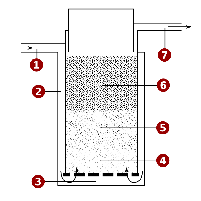 Plynový generátor pre použitie s koksom, polokoksom, alebo dreveným uhlím.